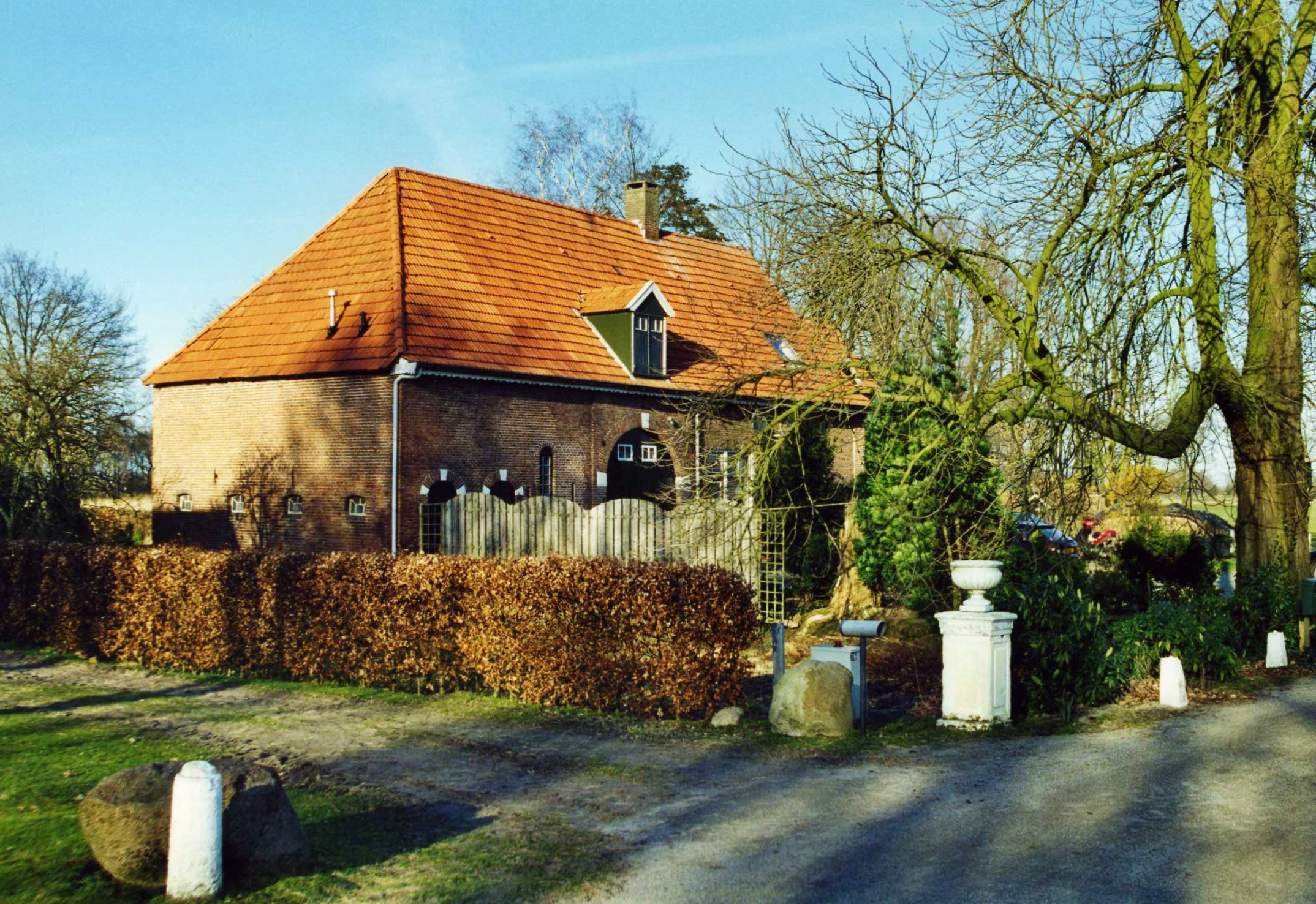 Het bouwhuis van de verdwenen havezate Stoevelaer te Herike.